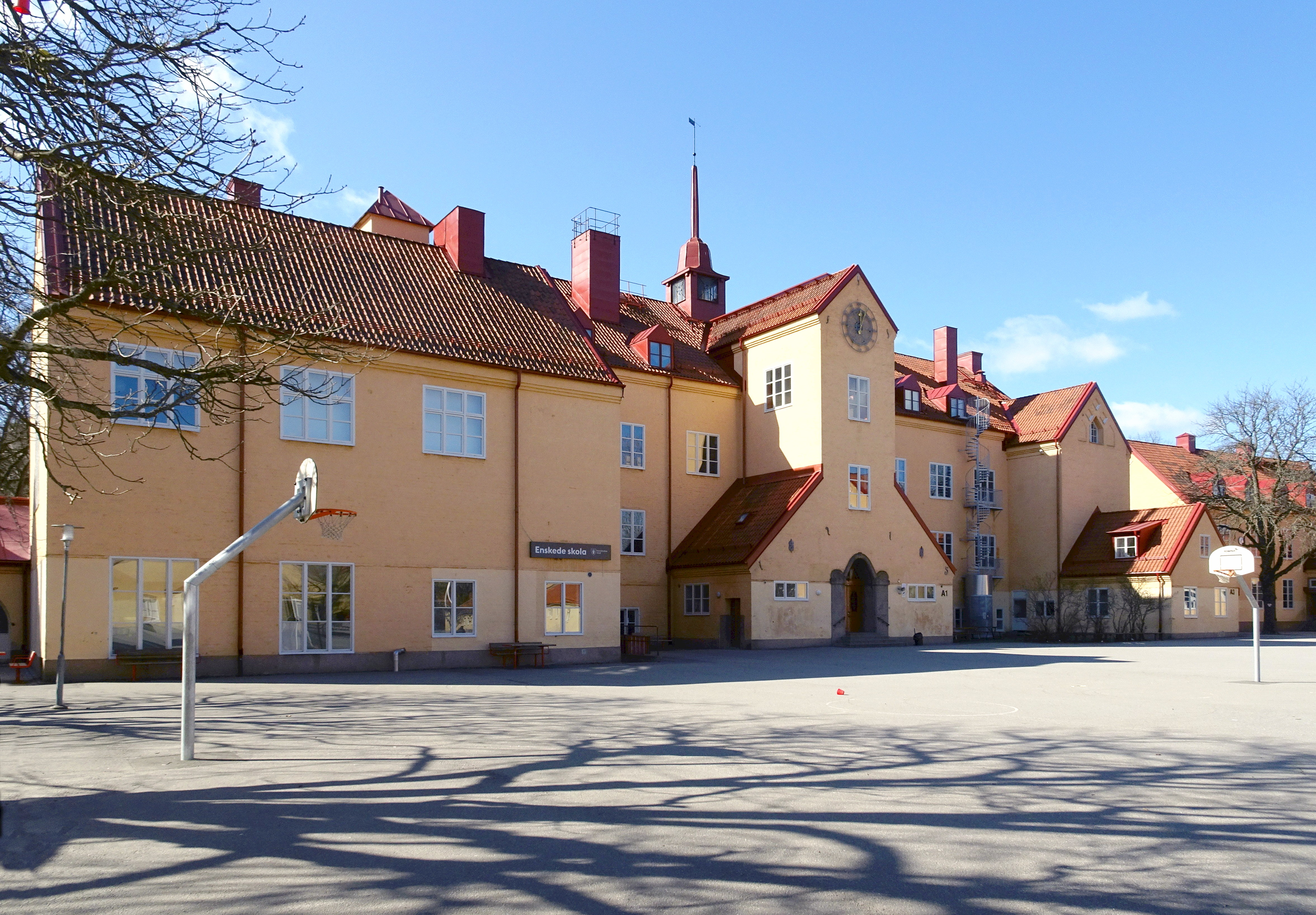 Enskede skola, byggår 1915, arkitekt Georg A. Nilsson